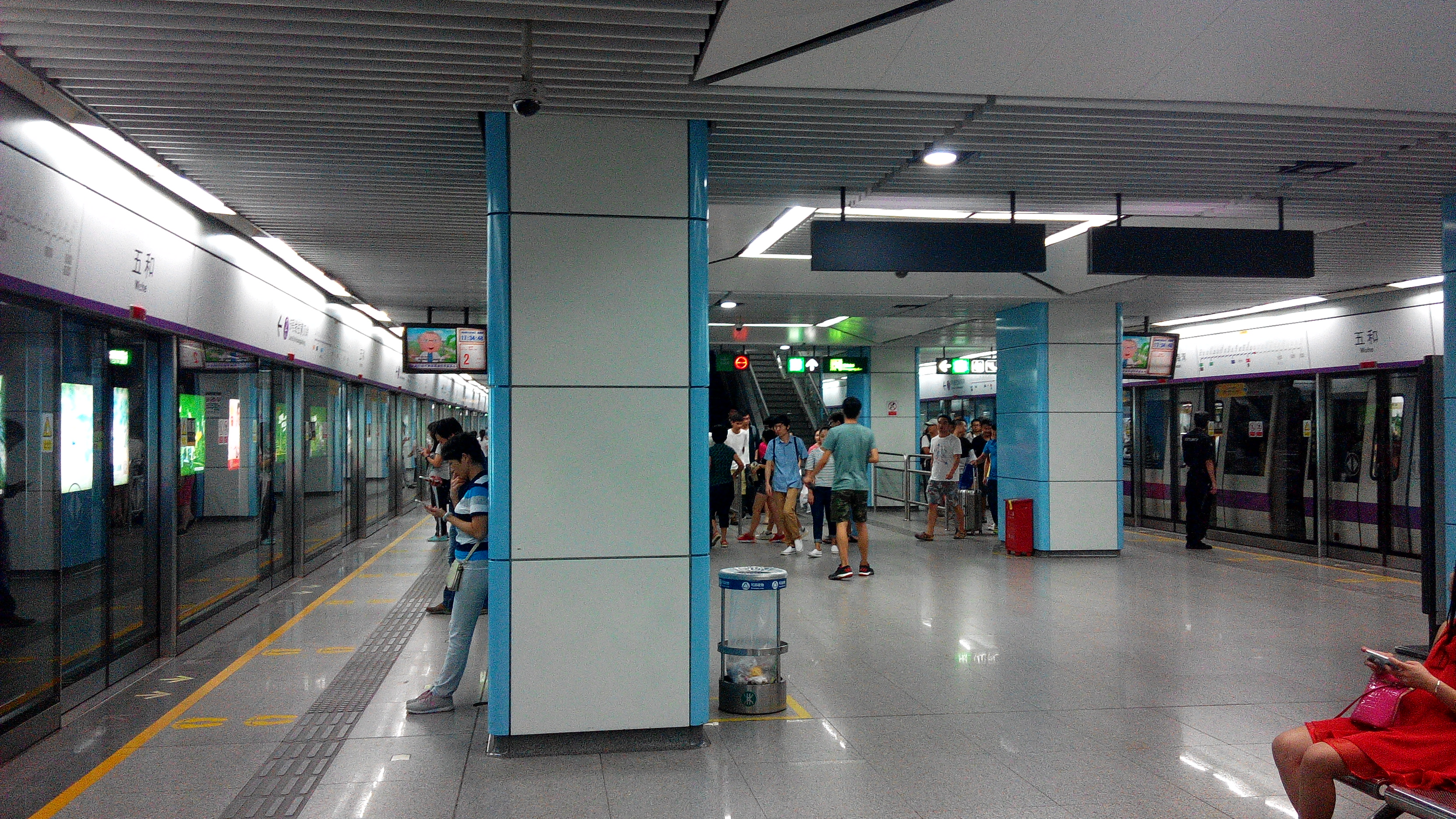 深圳地铁5号线五和站站台